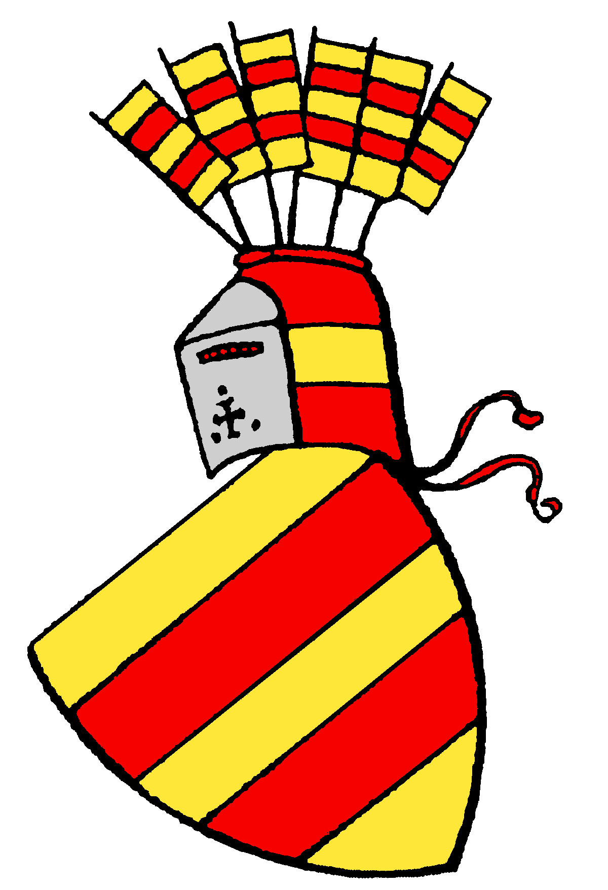 Ursprüngliches Wappen der Grafen von Oldenburg (Stammwappen des Hauses Oldenburg)